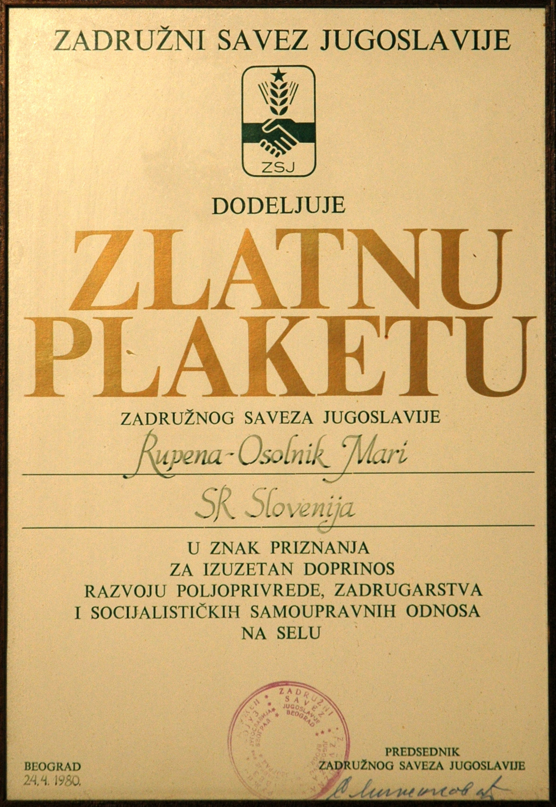 Zlata plaketa Zadružne zveze Jugoslavije Mari Rupena 1980